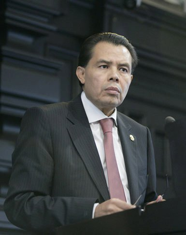 René Arce en el Senado